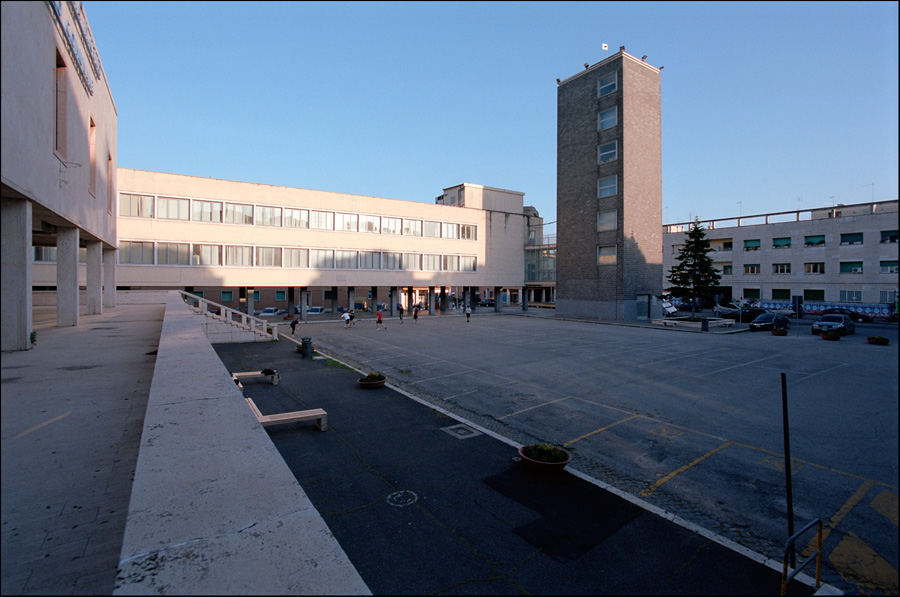 08/05/2009 : Guidonia (RM), piazza Matteotti (già piazza del Municipio): palazzo del comune (Giuseppe Nicolosi, 1937), ex casa del fascio e torre littoria (Giorgio Calza Bini, 1937)